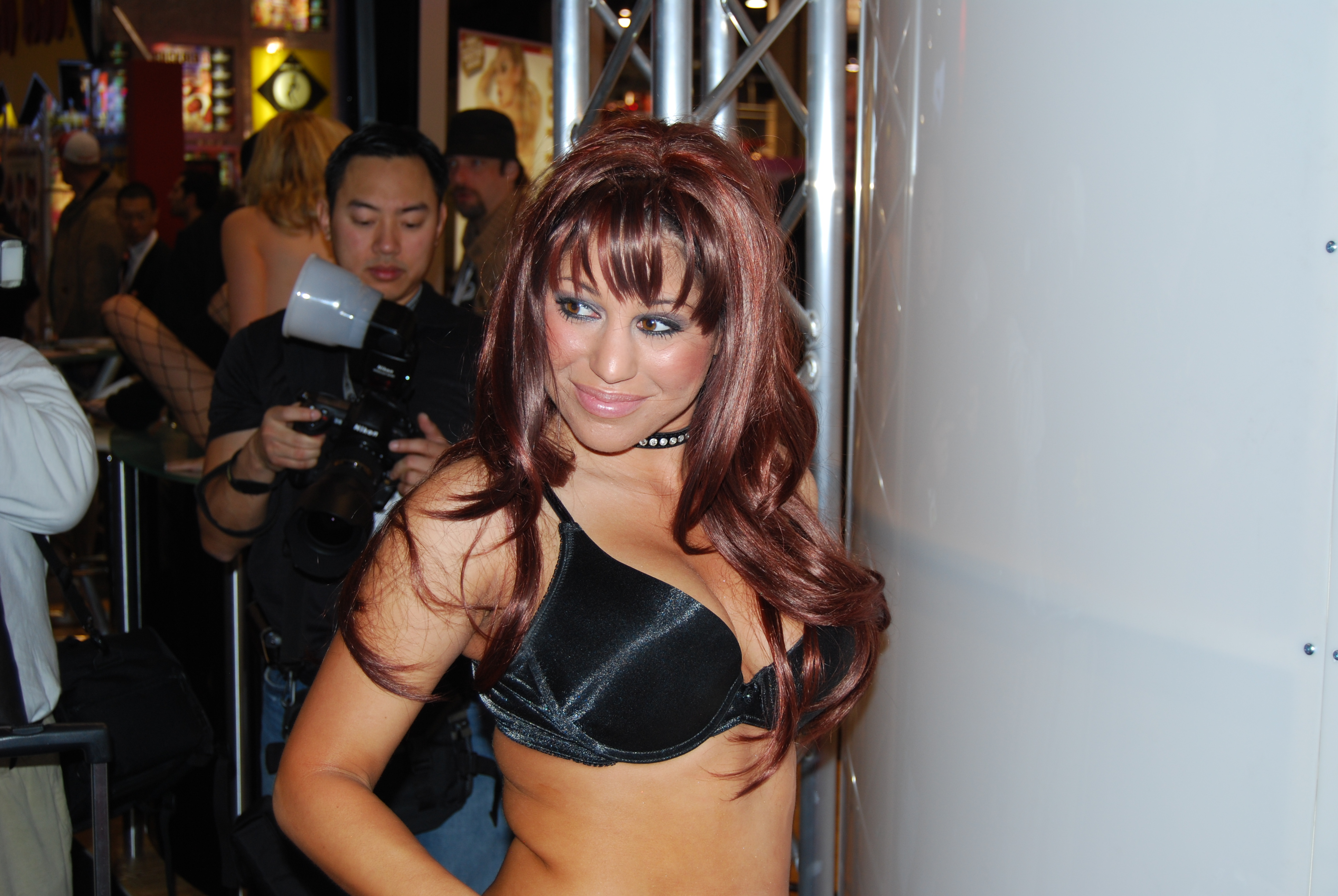 AEE2008_Nikon_Day2 358